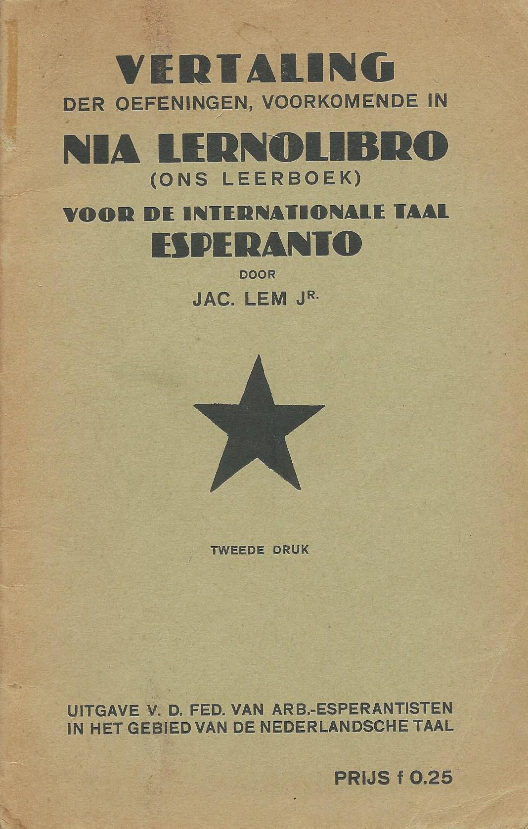 kovrilo de "Vertaling der Oefeningen, Voorkomende in Nia Lernolibro (Ons Leerboek) voor de Internationale Taal Esperanto", 1932